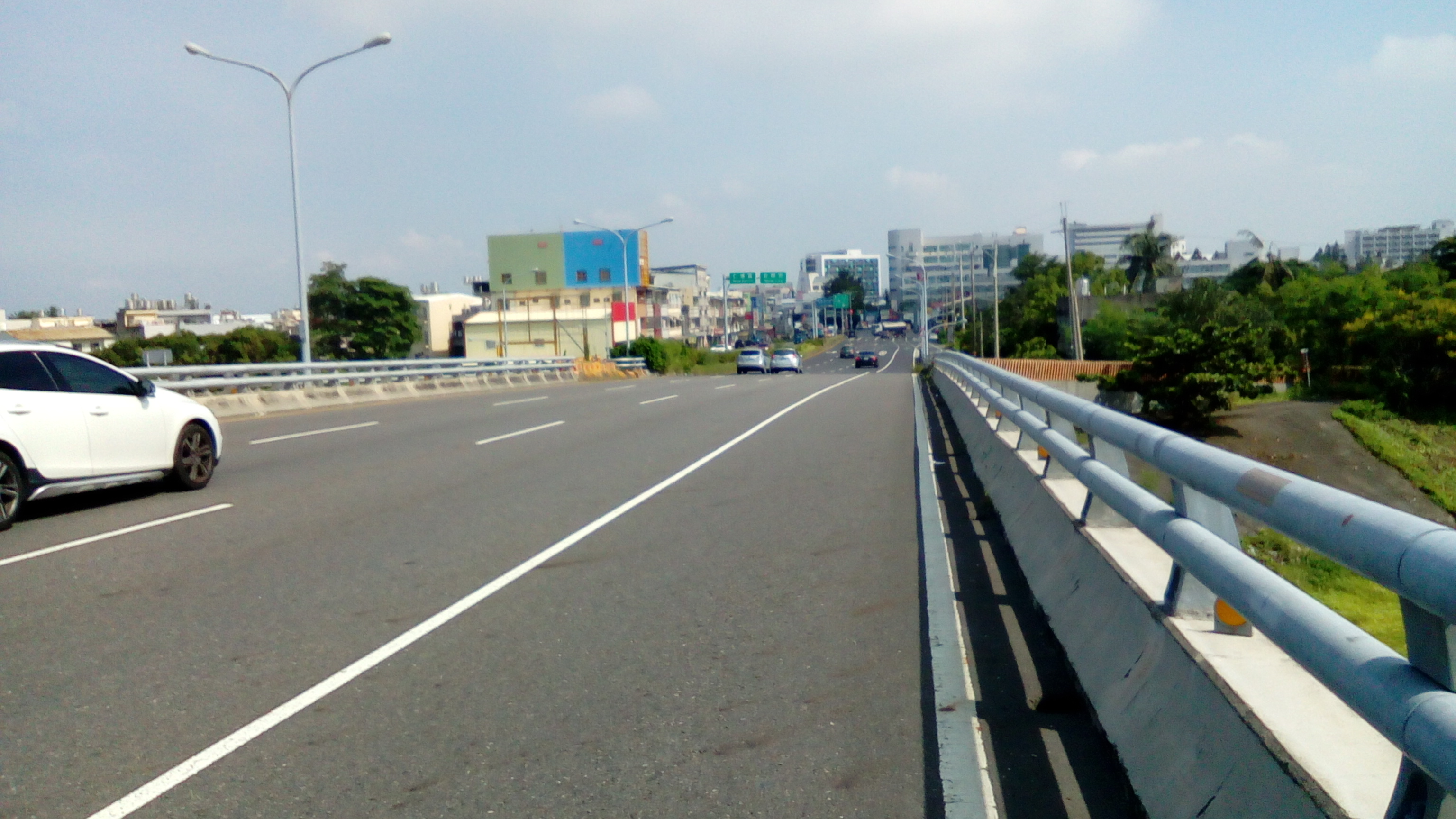 同上